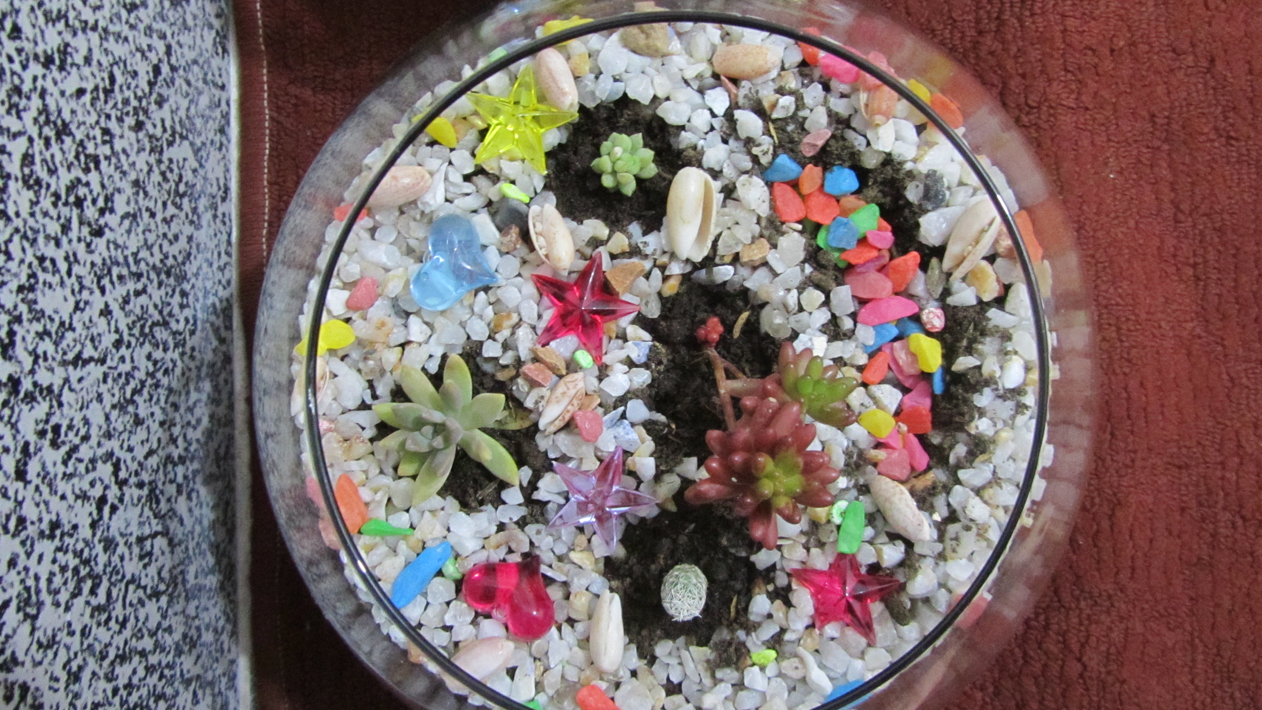 تراریوم